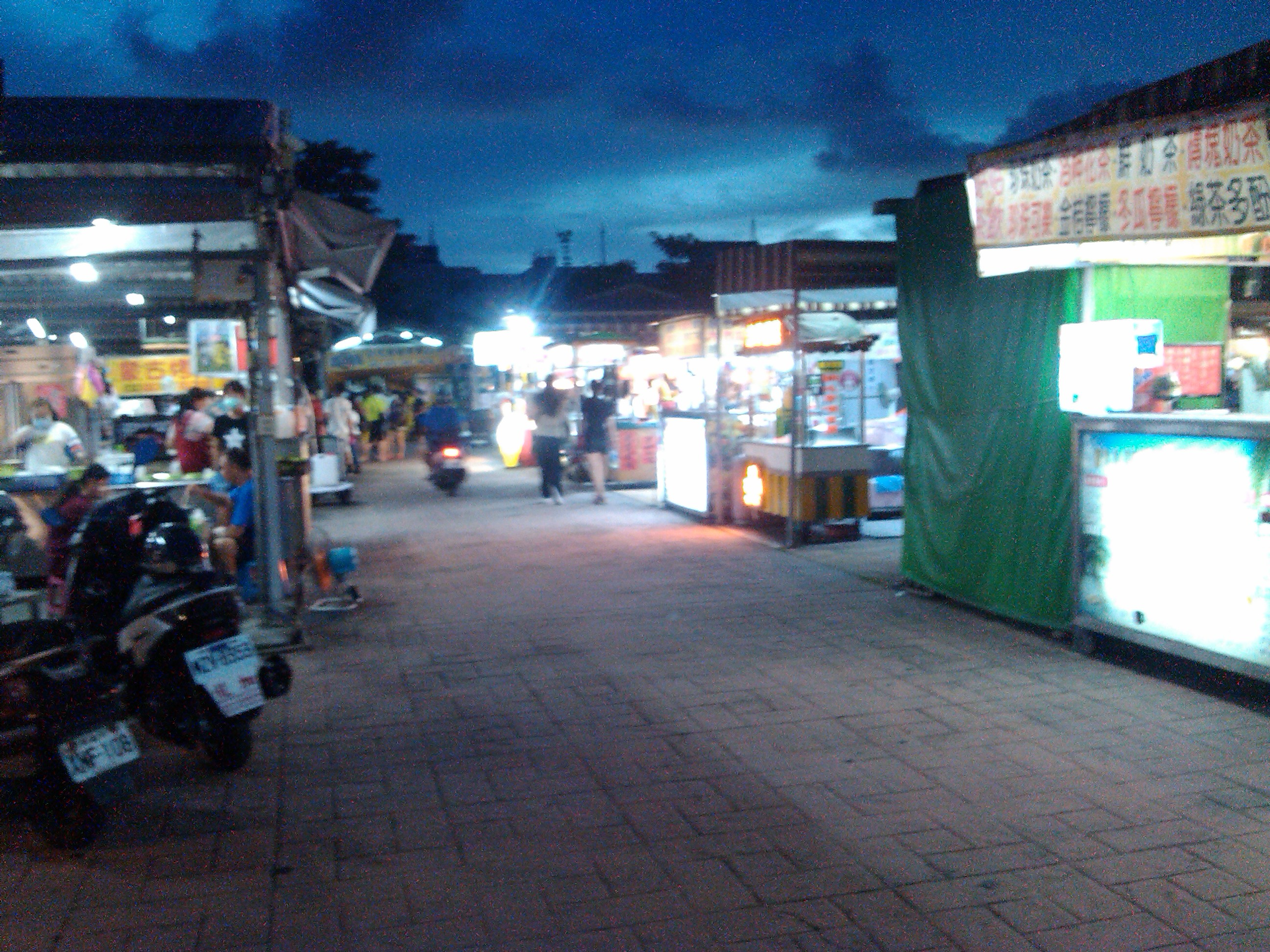 介於小港區漢民、學府及大鵬路口